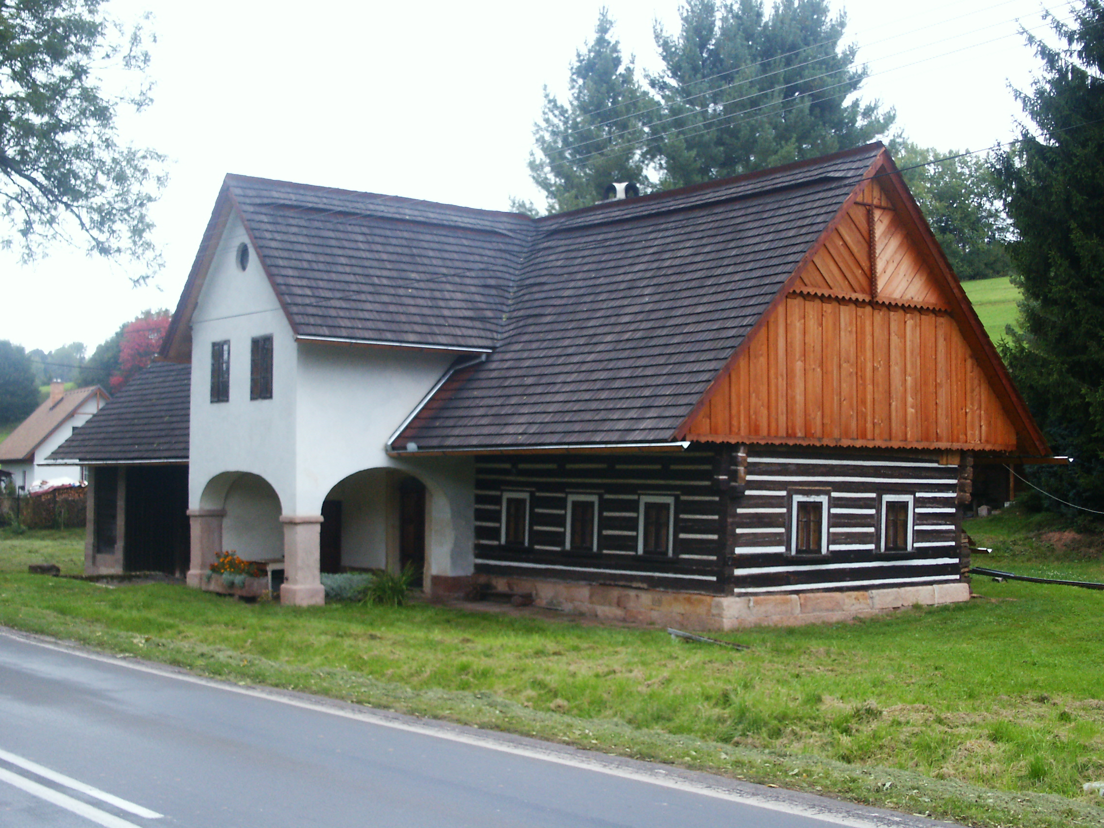 Venkovská usedlost, Dolní Olešnice 76